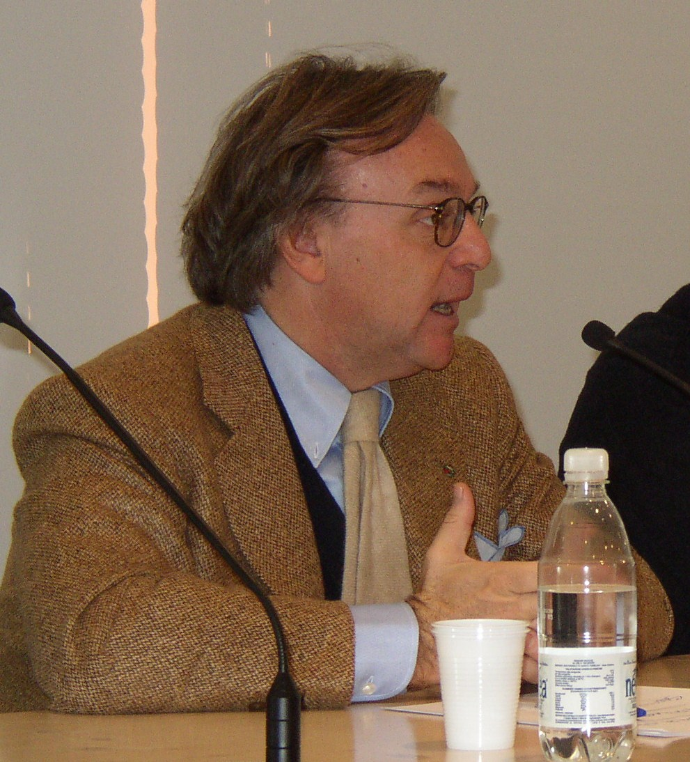 L'intervento di Diego Della Valle a Volo Radente, X seminario di formazione per giornalisti organizzato da Redattore Sociale